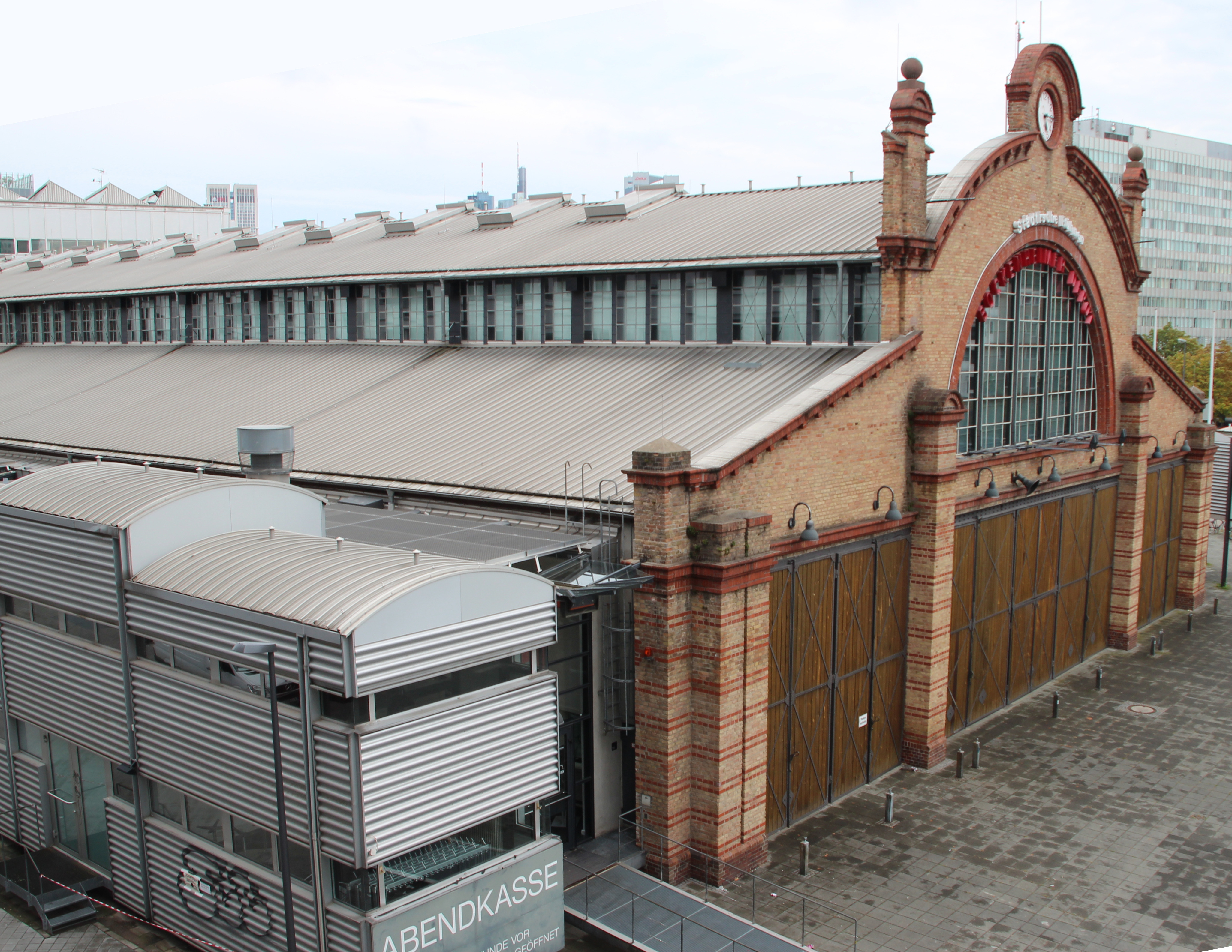 Bildinhalt: Das Bockenheimer Depot, vom Gabriel-Riesser-Weg aus gesehen Aufnahmeort: Frankfurt am Main, Deutschland